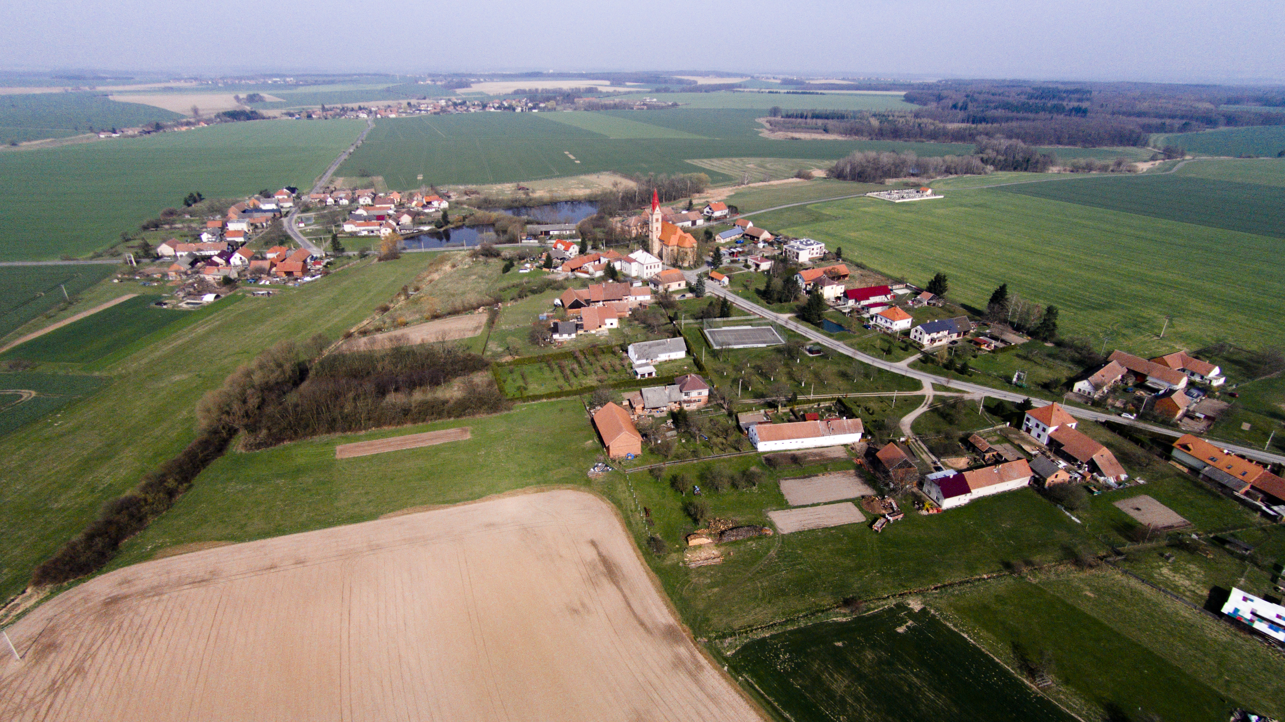 Letecký snímek Babice (okr. Hradec Králové)